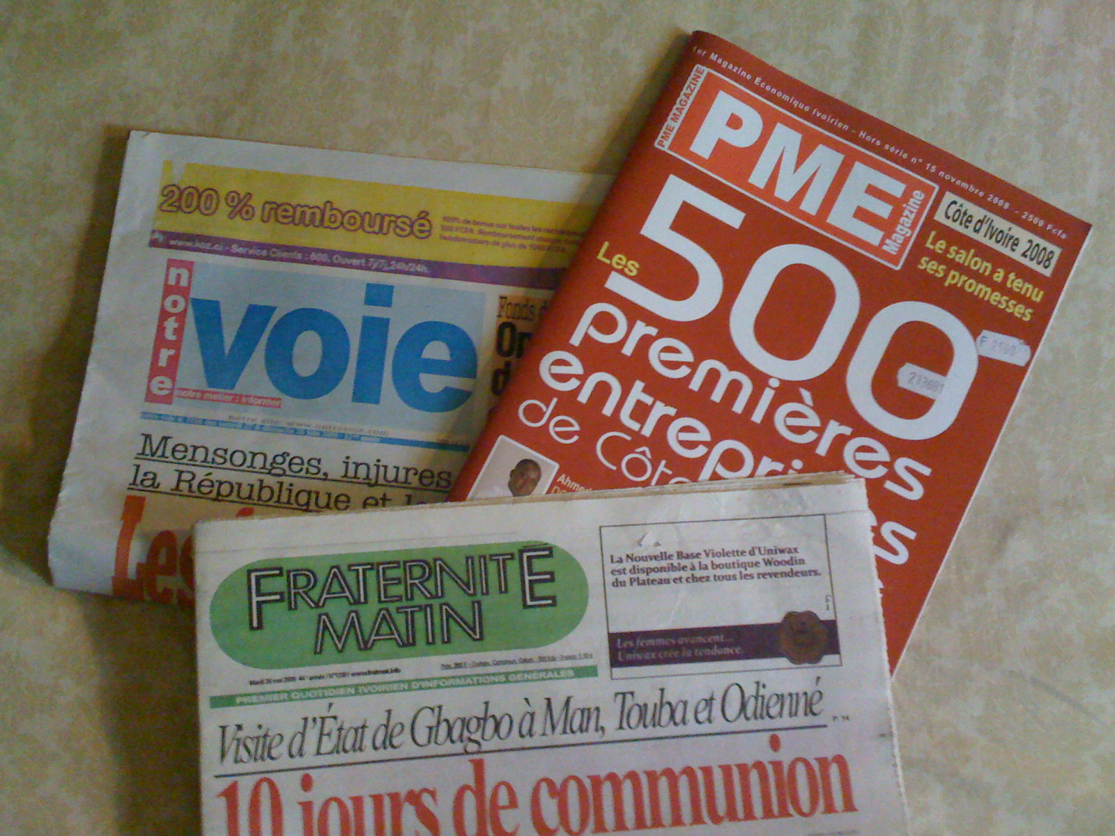 Quelques organes de presse de Côte d'Ivoire